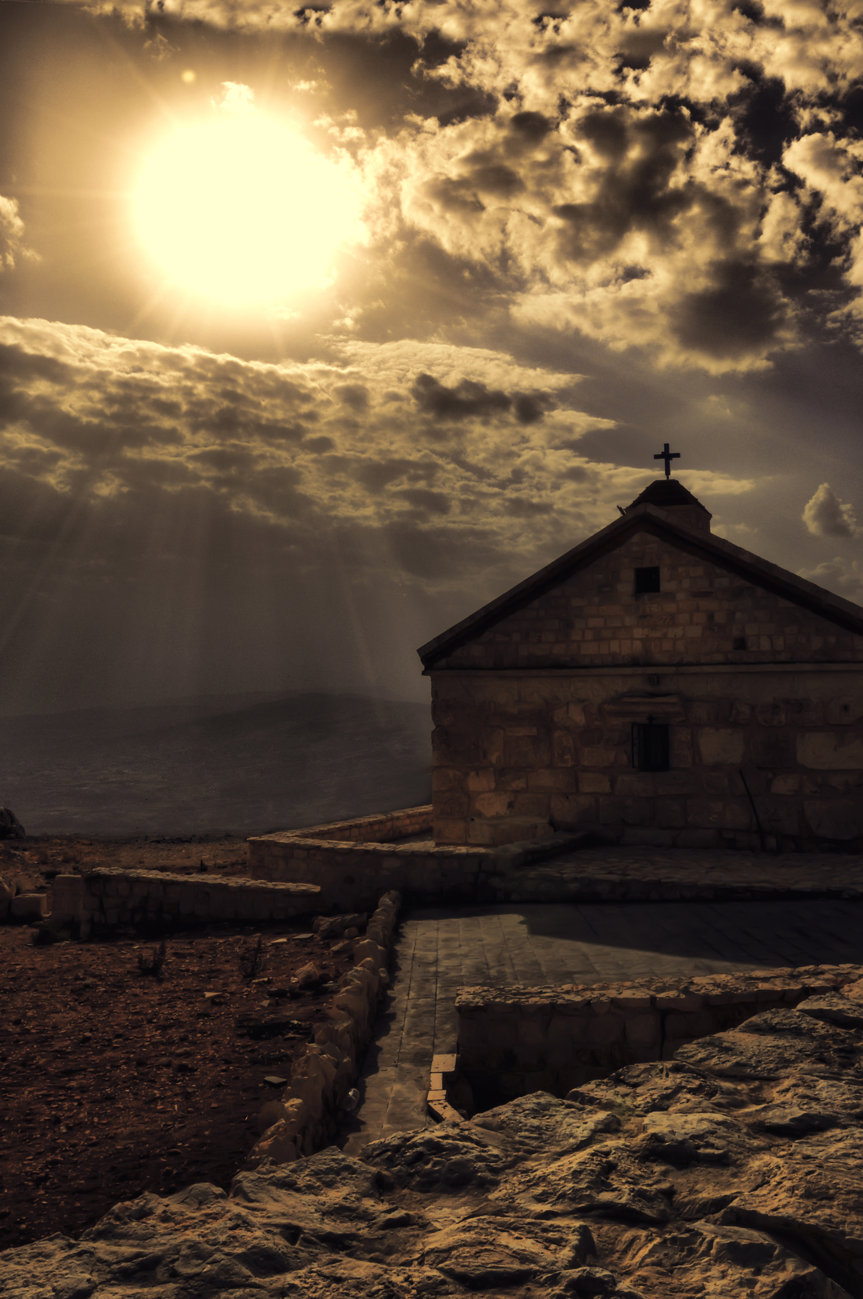 دير الشروبيم